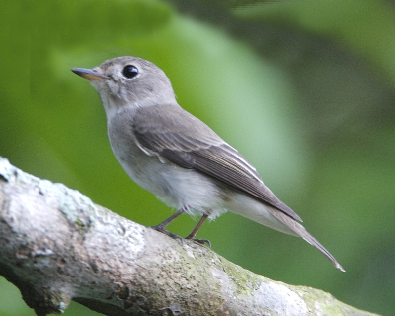 Asian Brown Flycatcher Muscicapa dauurica Residential garden, Merryn Road, Singapore 26th. October 2008 Malay: Sambar Asia Indonesian: Bubik, Sikatan bubik